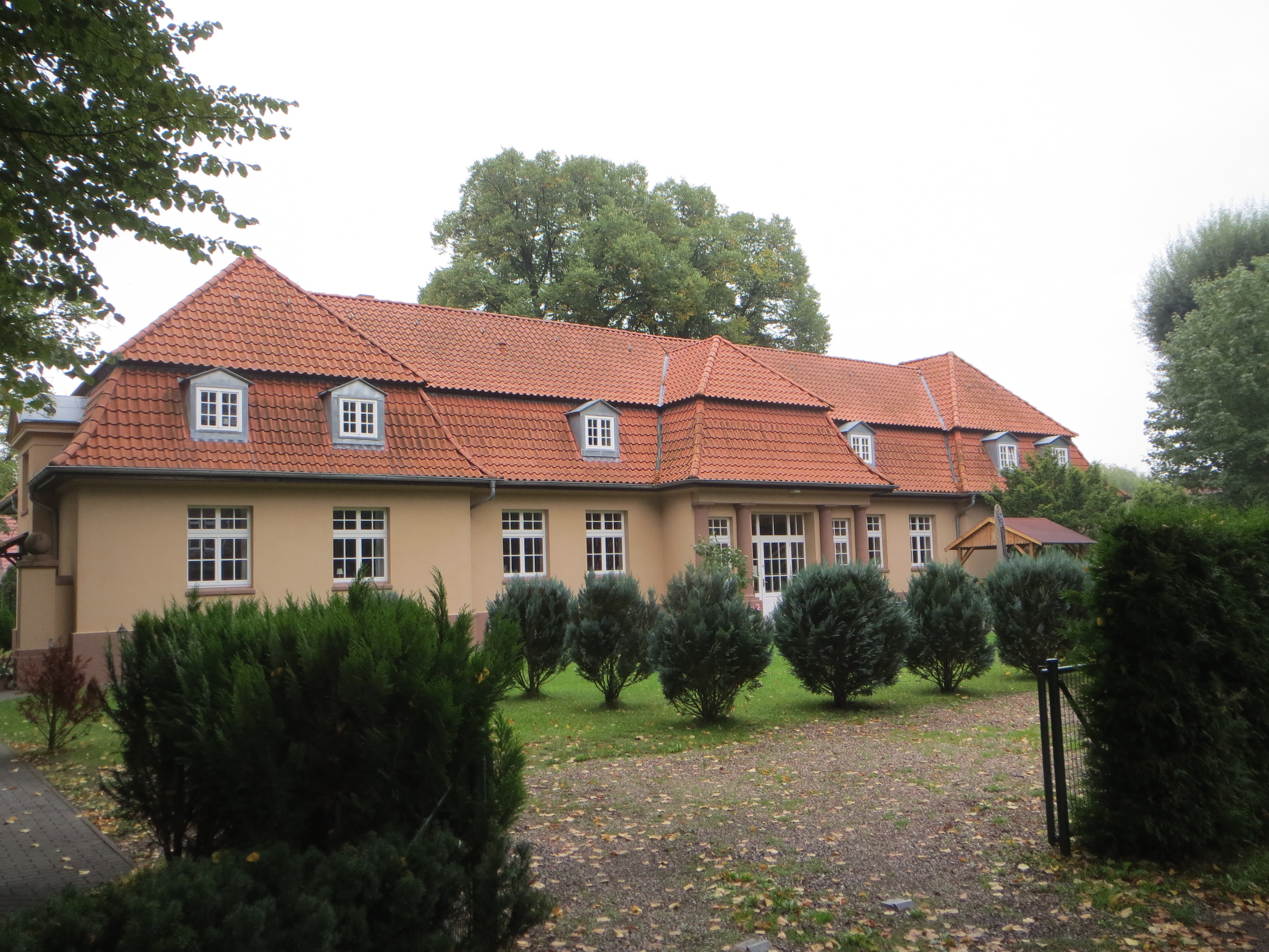 Straße des Friedens in Neu Kaliß, Mecklenburg; Remise im Bausch-Park (Nebengebäude zu den ehemaligen Villen der Unternehmerfamilie Bausch); unter Denkmalschutz